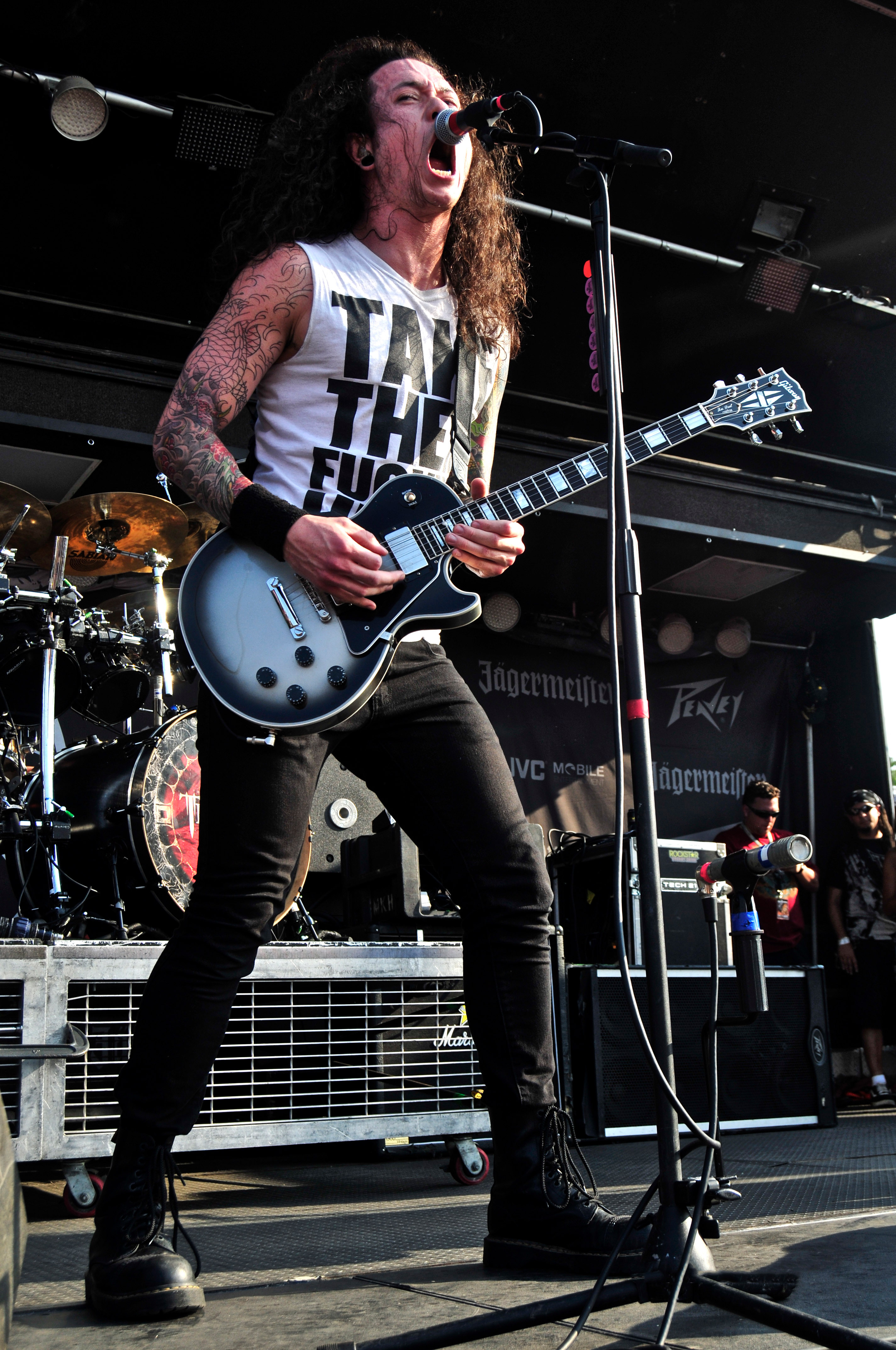 Matt Heafy con i Trivium al Mayhem Fest ad Hatford